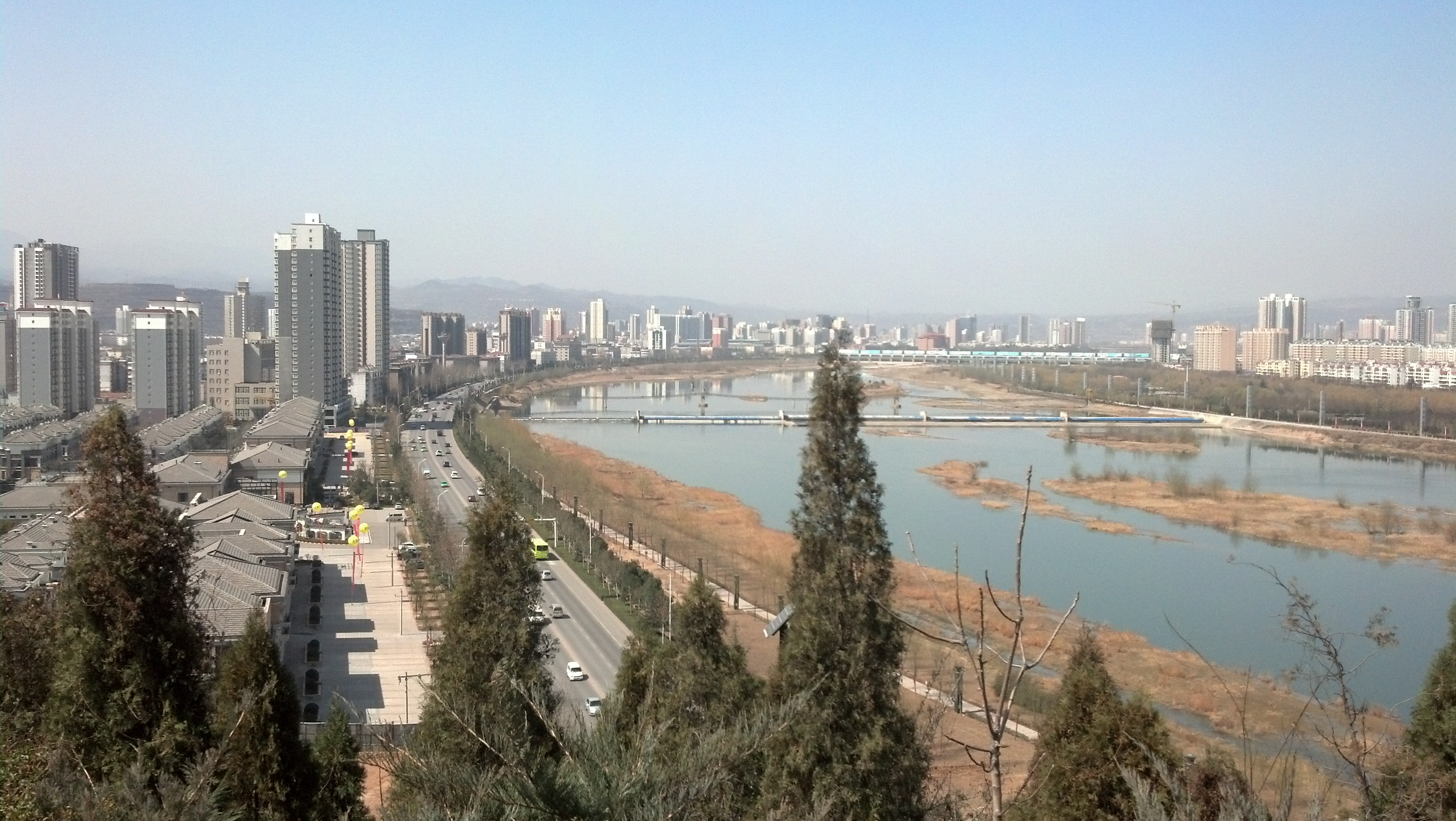 Blick in Richtung Westen